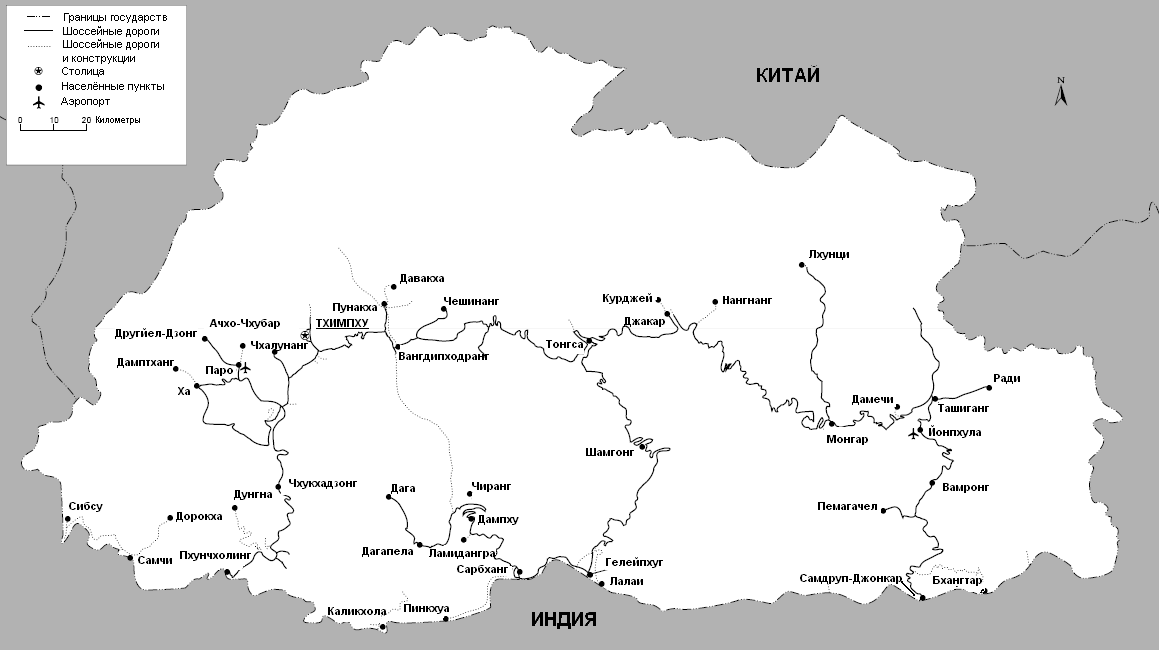 Карта Бутана